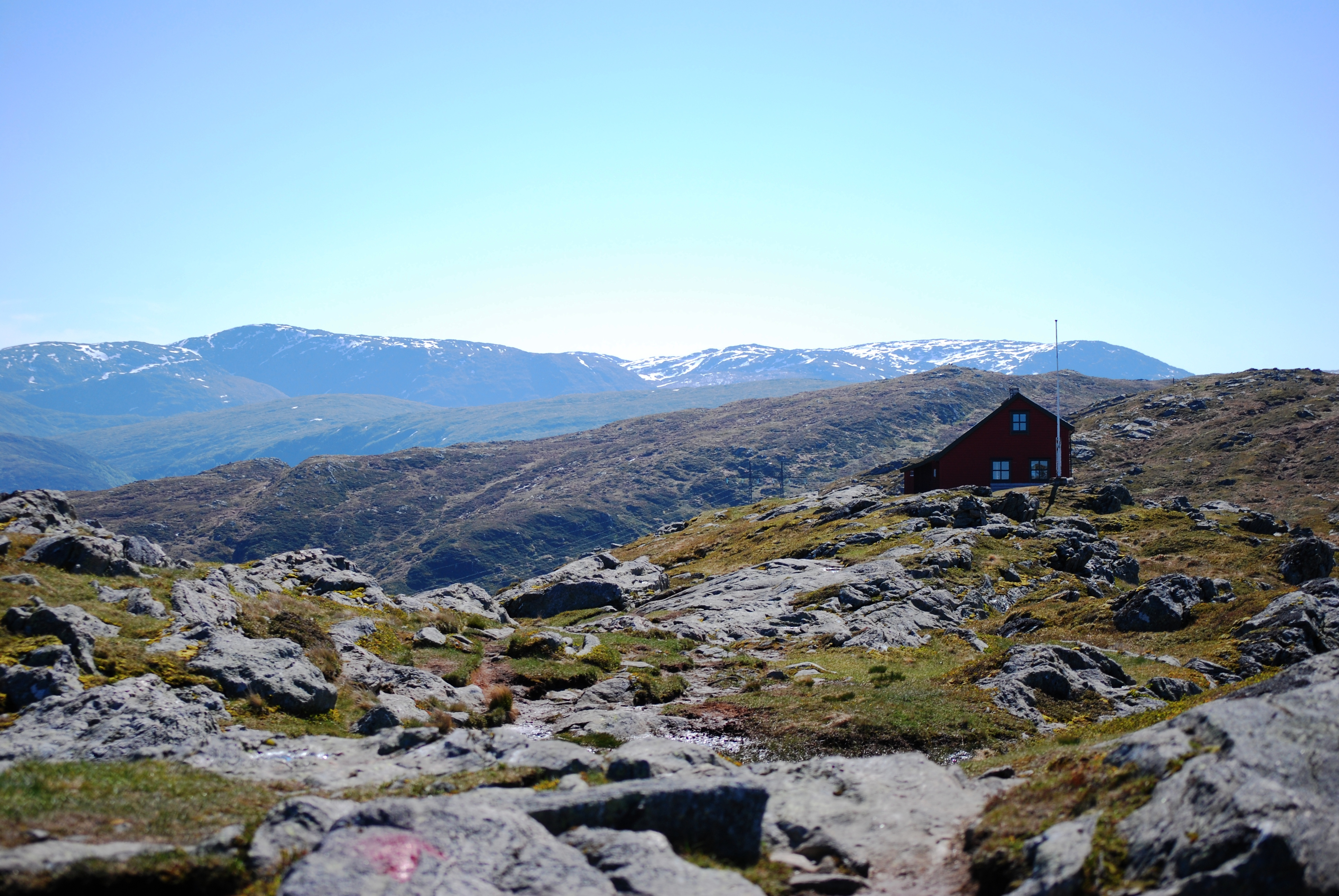 Description=Vardegga